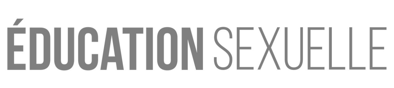 Éducation sexuelle logo